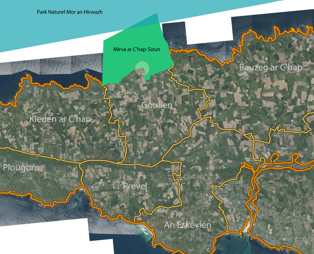 Kartenn ar C'hab Sizun, lec'hiet enni Mirva ar C'hab hag un tamm ar park naturel mor an Hirwazh.